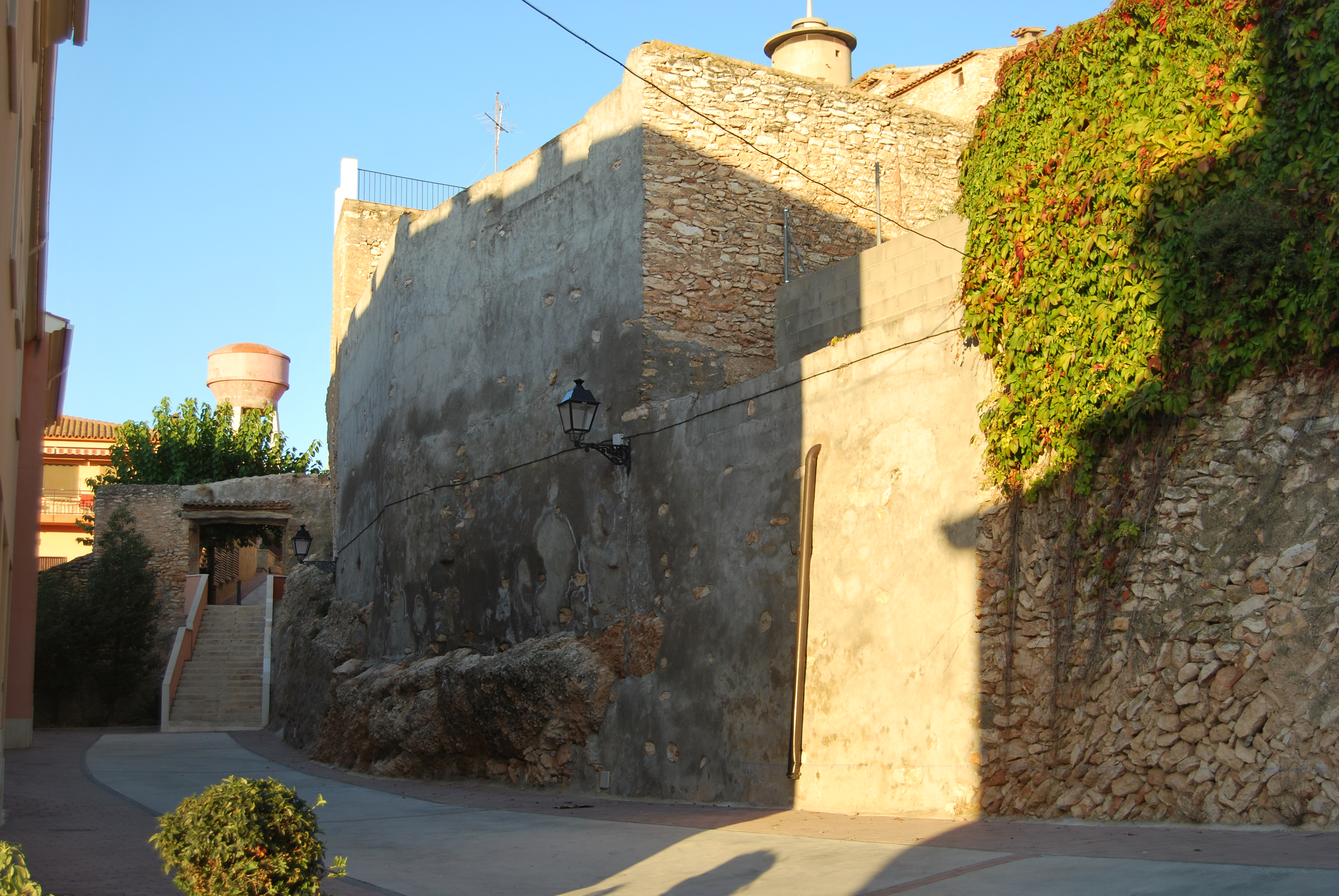 Centre històric d'Alió